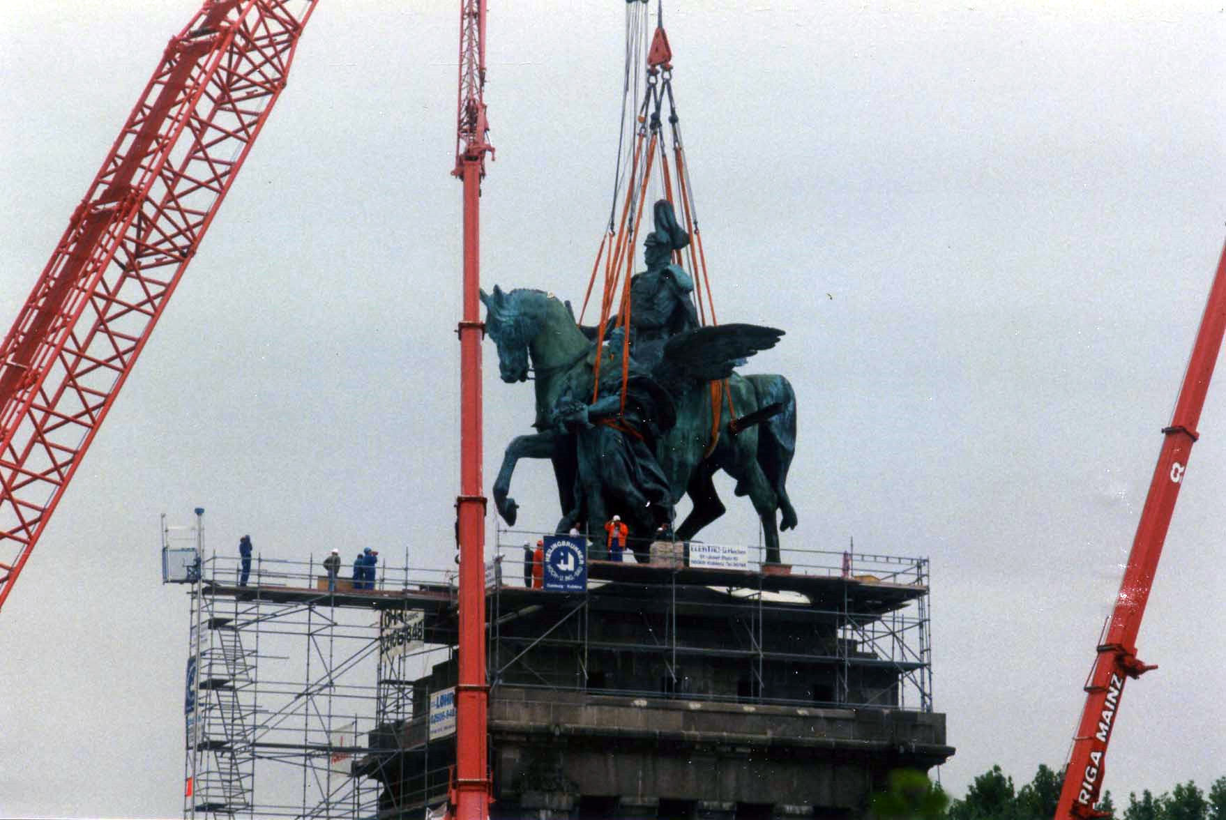 Das rekonstruierte Reiterstandbild Wilhelms I. wird wieder auf den Sockel des Deutschen Ecks gehoben